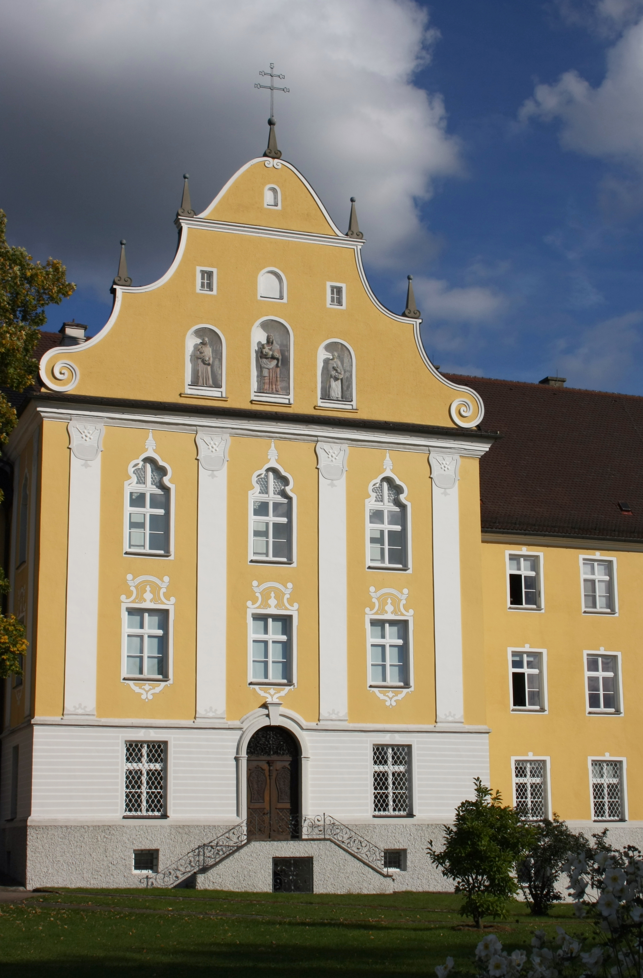 Klosterkirche Maria Medingen in Mödingen (Landkreis Dillingen an der Donau), Westtrakt (1720—1725) des ehemaligen Dominikanerinnenklosters von Dominikus Zimmermann, Ansicht von Westen